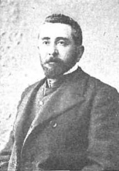 Arturo Reyes. Fotografía de Manuel Compañy.